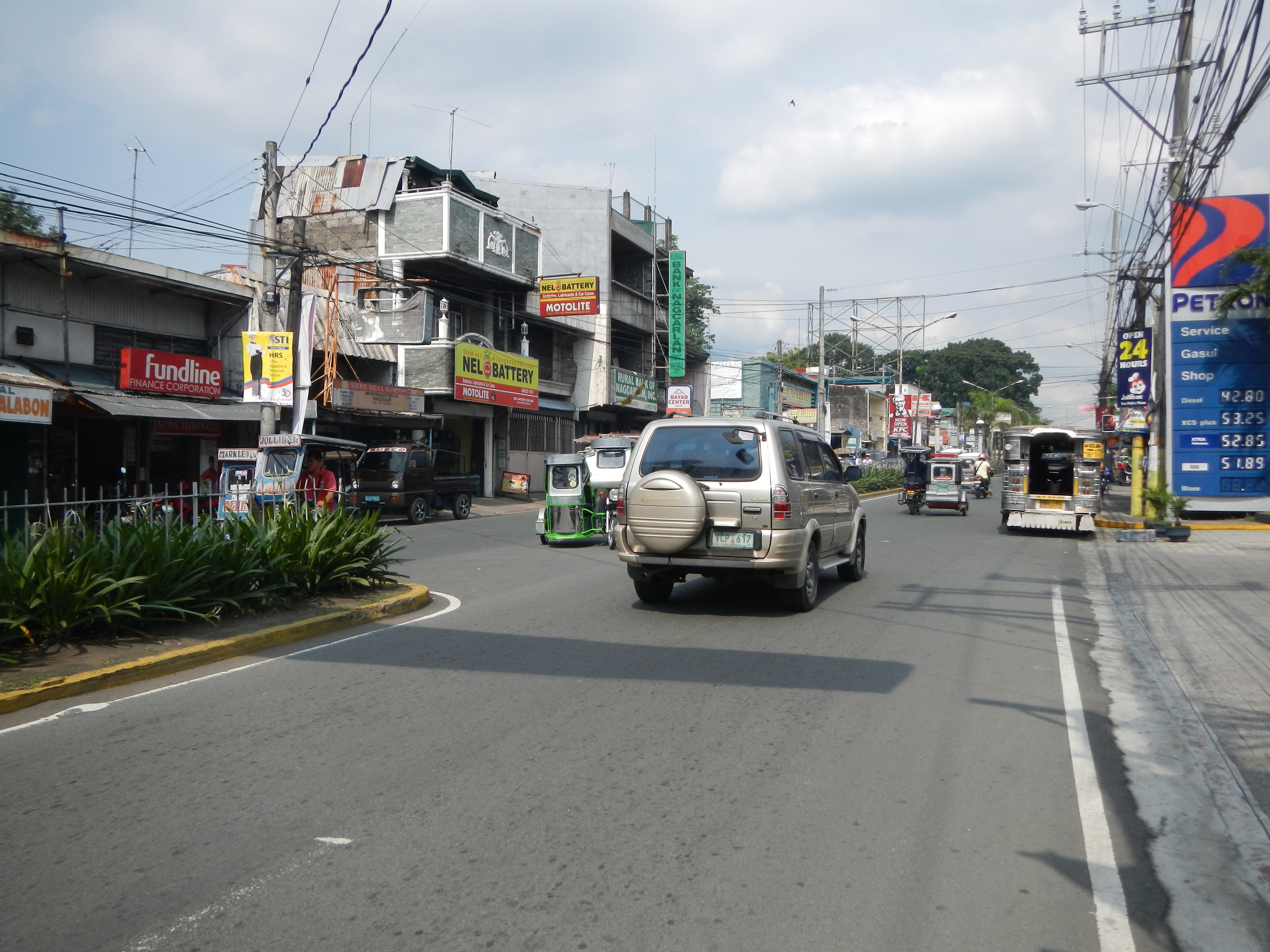 Jose Rizal Avenue, San Pablo, Laguna, Philippines.